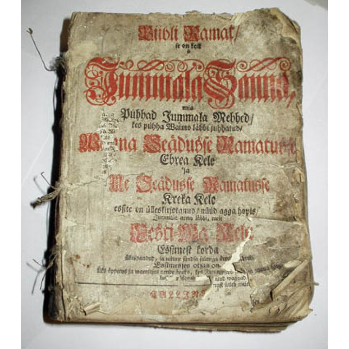 bible